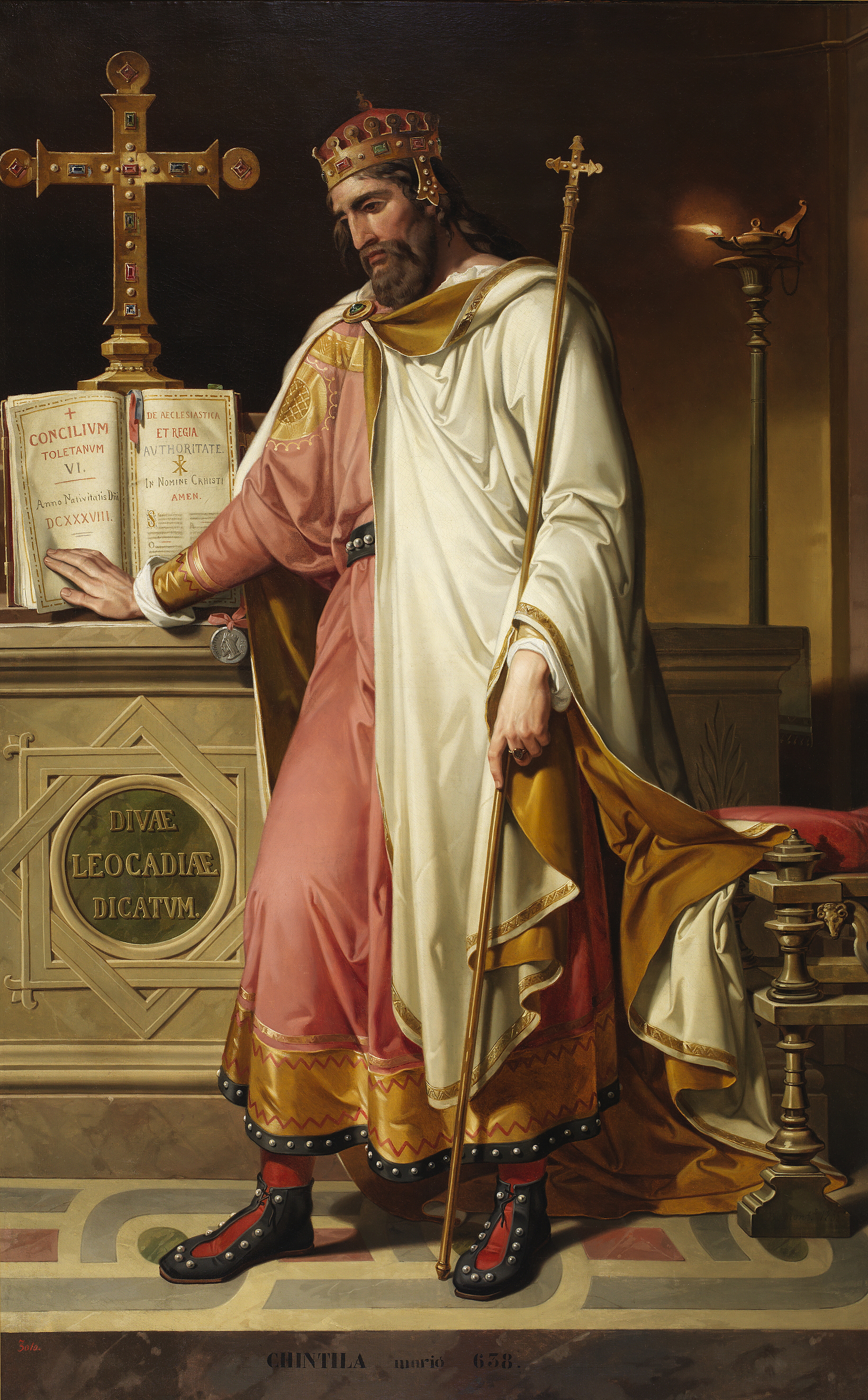 El lienzo representa a Chintila, que fue rey de los visigodosentre los años 636 y 639 ó 640. Sucedió al rey Sisenando y fue sucedido a su vez por su hijo, el rey Tulga. El rey Chintila aparece representado de pie, en un interior probablemente religioso, con su mano apoyada en un libro abierto sobre un altar, detrás del cual se ve una cruz que evoca la orfebrería prerrománica asturiana. Viste túnica de color carmesí y manto blanco, y con su mano izquierda sujeta el largo cetro.